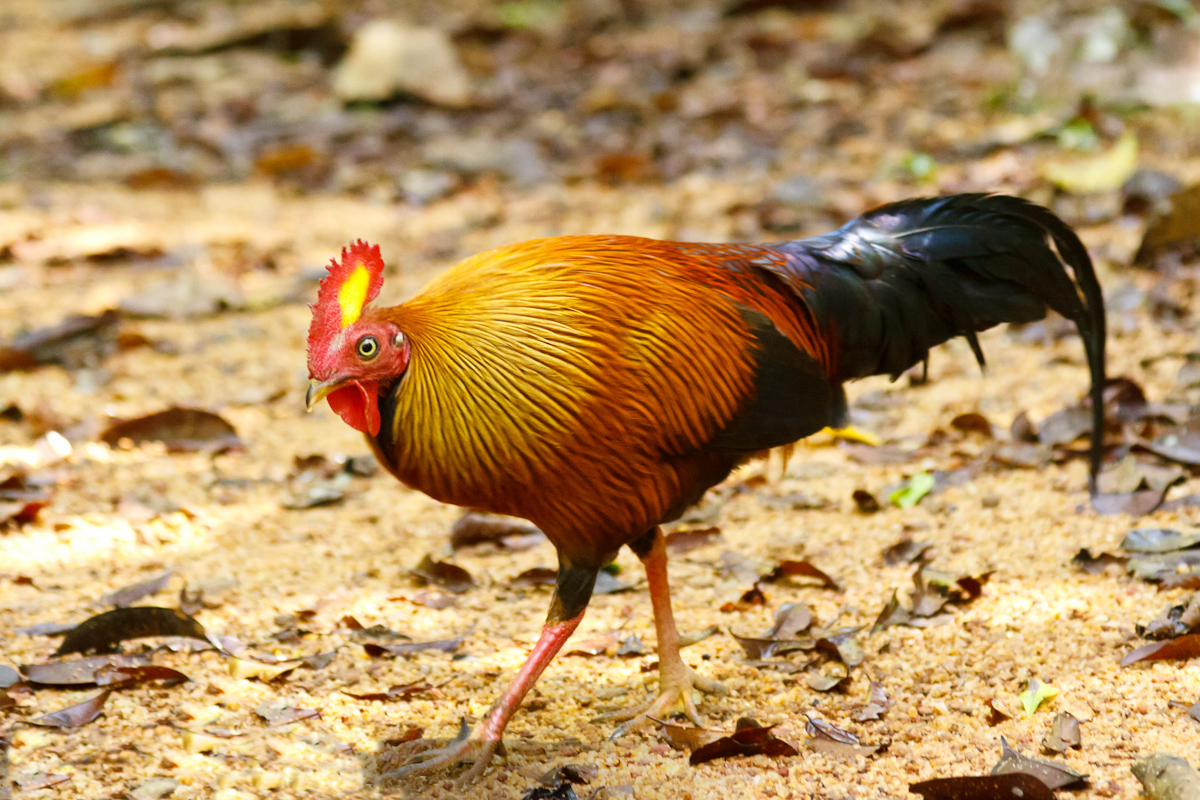 Sri Lanka Junglefowl Gallus lafayetii at Sinharaja Forest Reserve, Sri Lanka